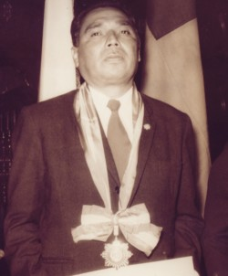 Profesor Antonio Romero Palacios